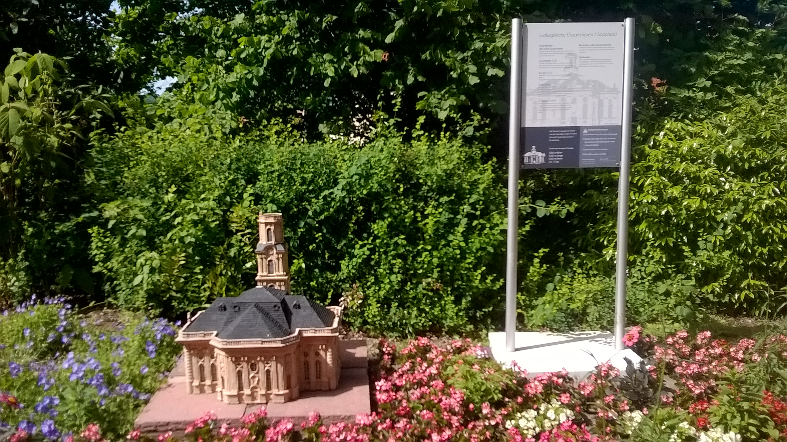 Miniatur der Ludwigskirche, zu sehen in der Gulliver-Welt 2.0 in Bexbach.